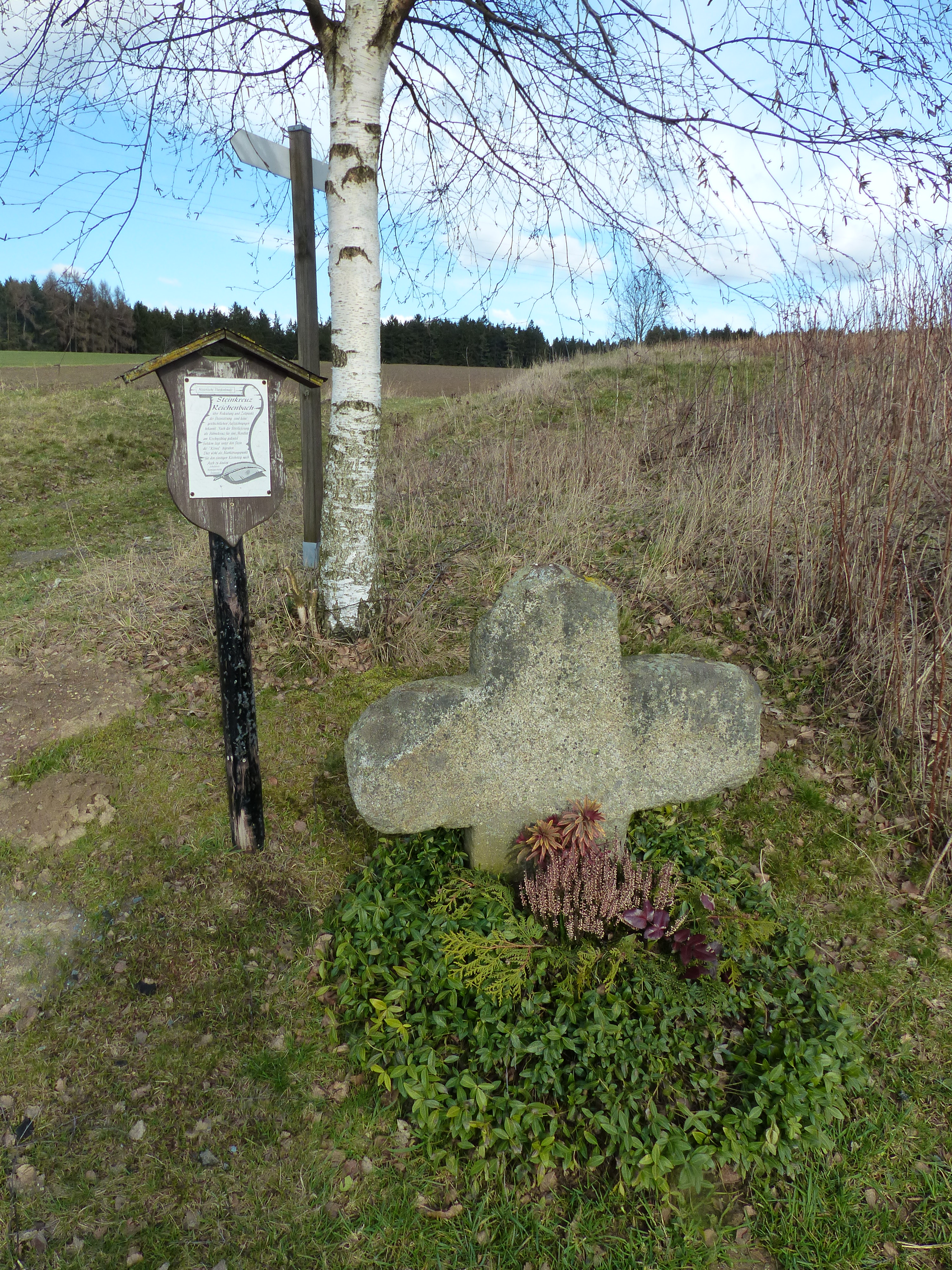 Steinkreuz Ortsende Reichenbach Richtung Lauterbach